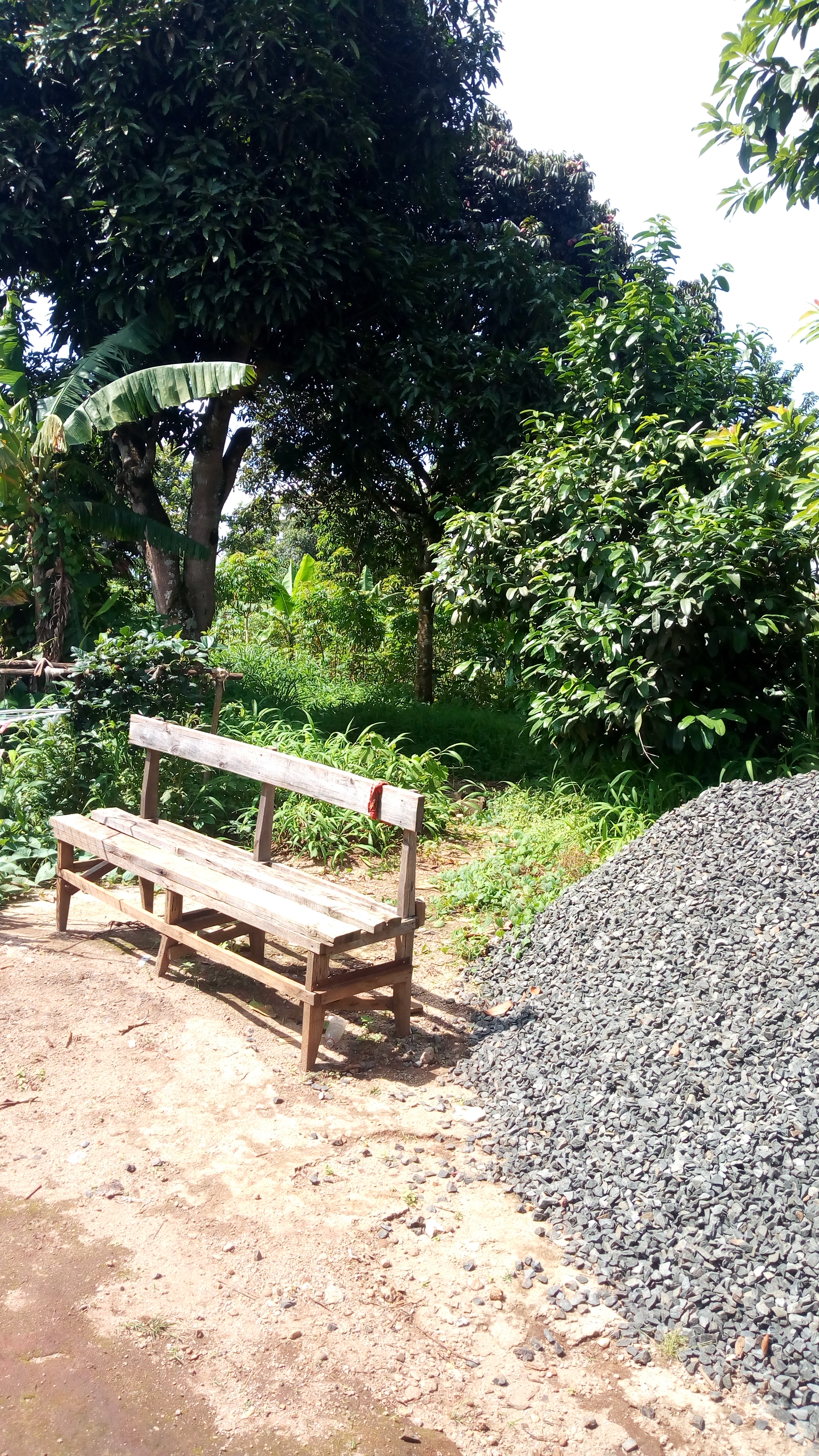 Same Joe's bushes mile 7 mankon, Bamenda